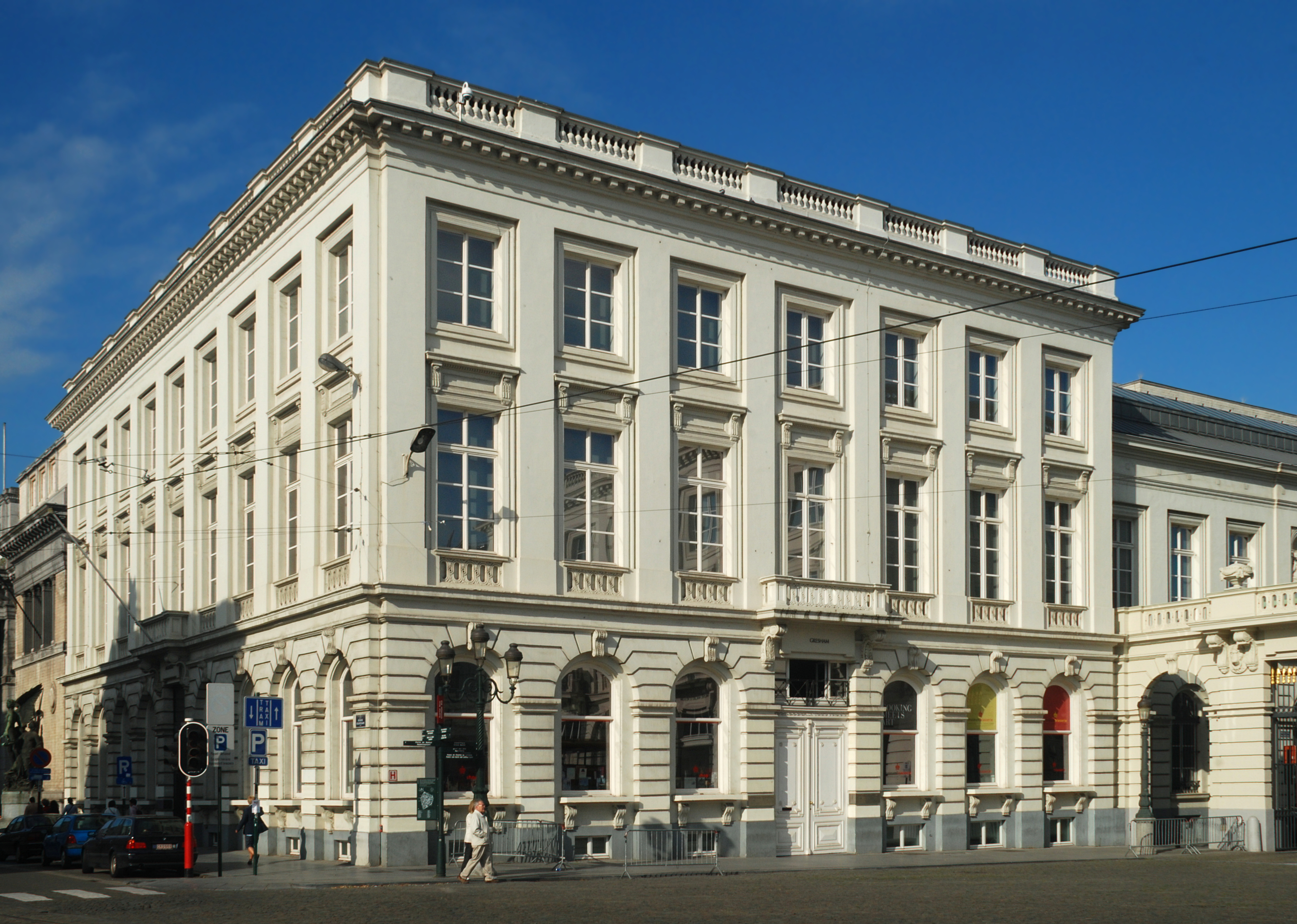 Belgique - Bruxelles - Hôtel Gresham